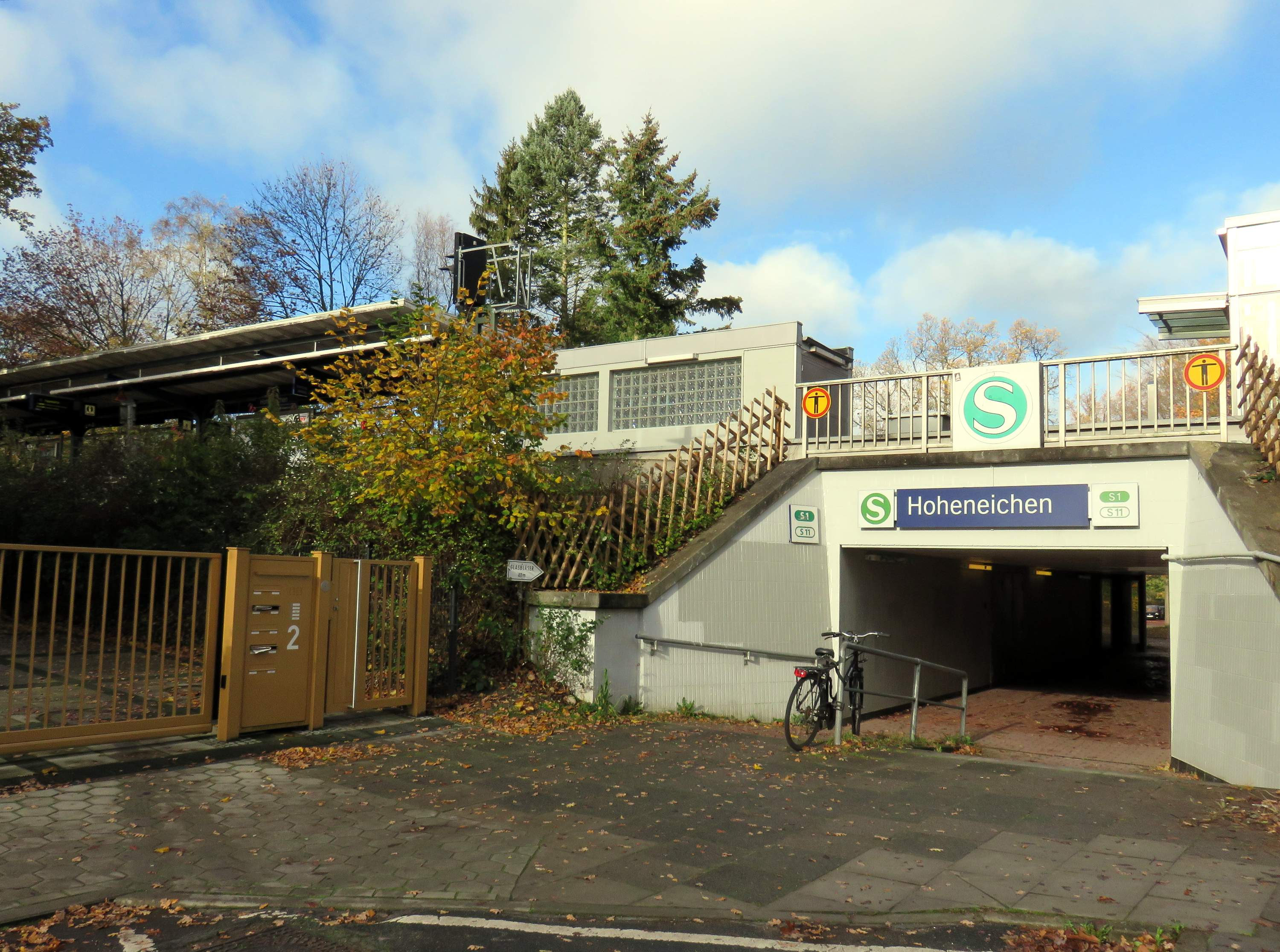 S-Bahnhof Hoheneichen in Hamburg-Wellingsbüttel der Linien S1 und S11, Eingang Süd (Schwarzdornweg).